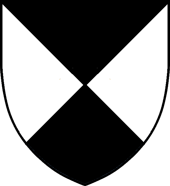 Vapensköld för danska adelsätten Hak